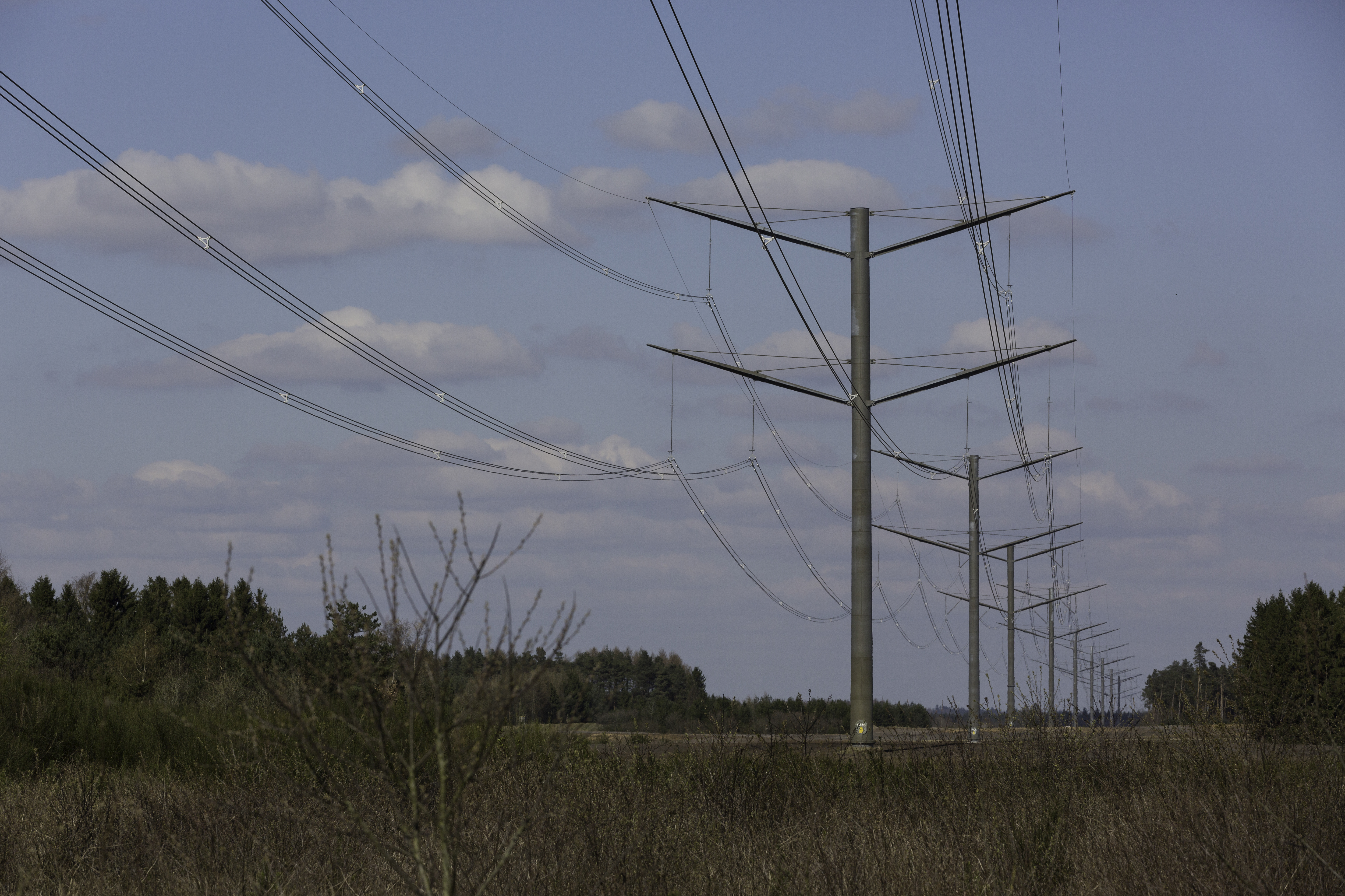 Højspændingsforbindelsen Kassø–Tjele på vejen mellem Ejstrupholm og Brande